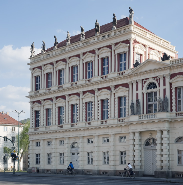 Potsdam in Brandenburg. Die Häuser in der Breite Straße 8 - 12 stehen unter Denkmalschutz. Der Entwurf für die Fassade stammt von Georg Christian Unger. Kopfbau zur Dortustraße.